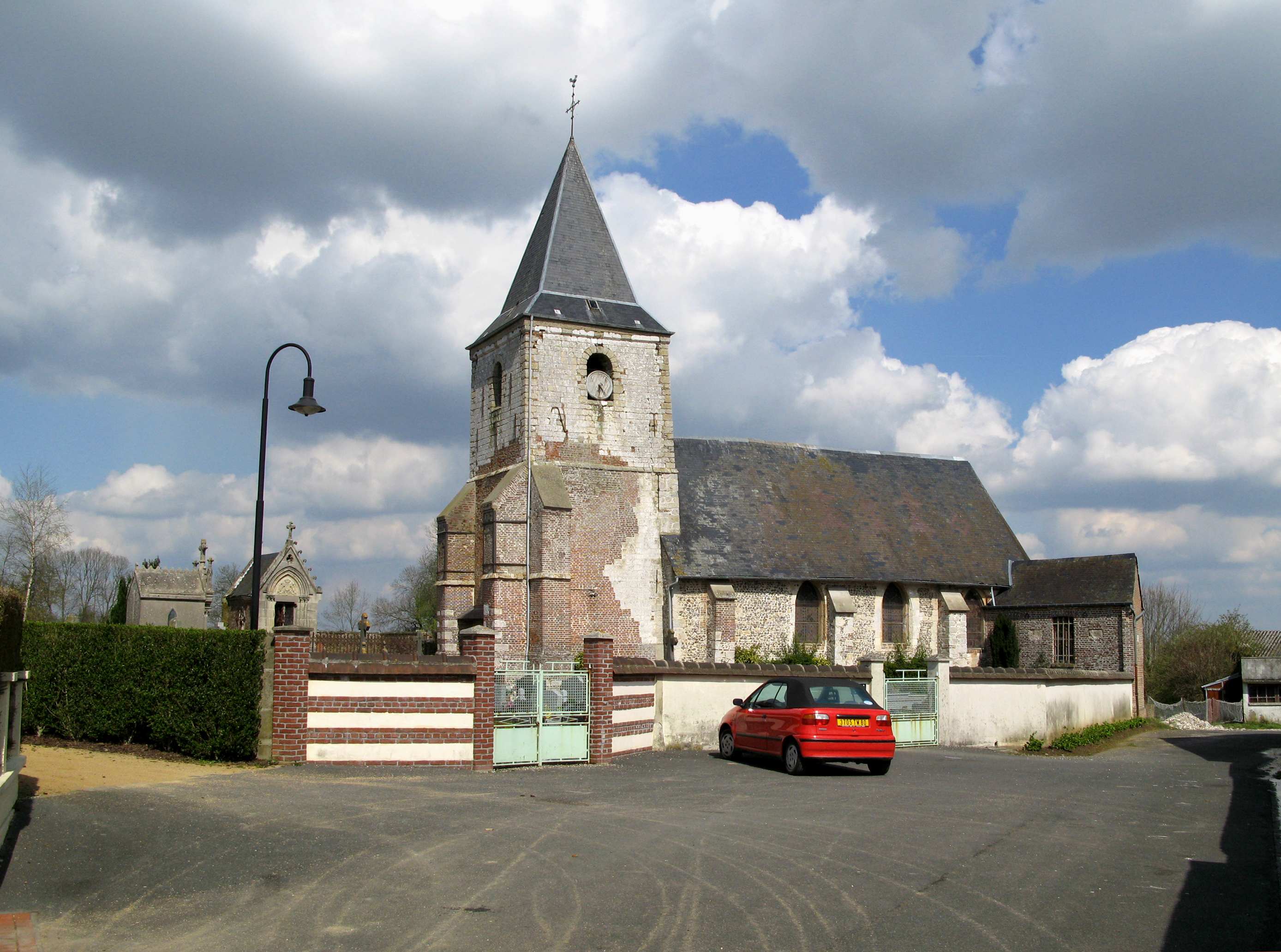 Ochancourt (Somme, France) - L'église Saint-Ouen et le cimetière.